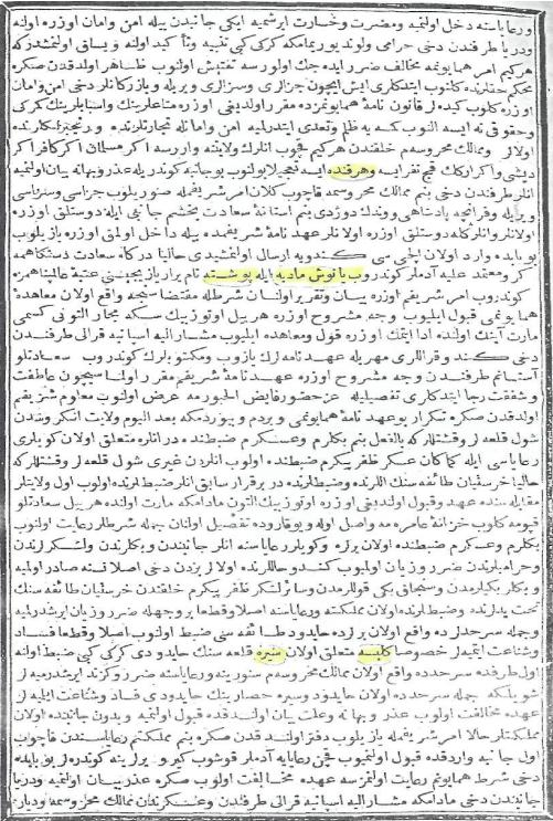 1547 tarihli Edirne Antlaşması'nın metni, 2. sayfa.